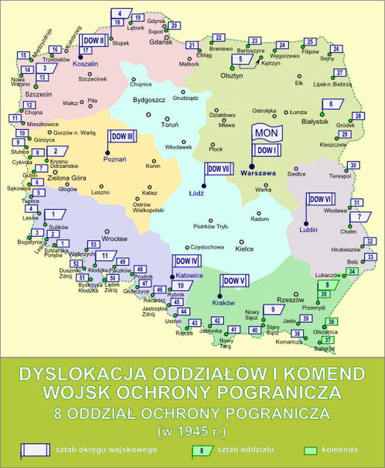 Dyslokacja oddziałów i komend Wojsk Ochrony Pogranicza - 8 Oddział Ochrony Pogranicza w 1945 r.